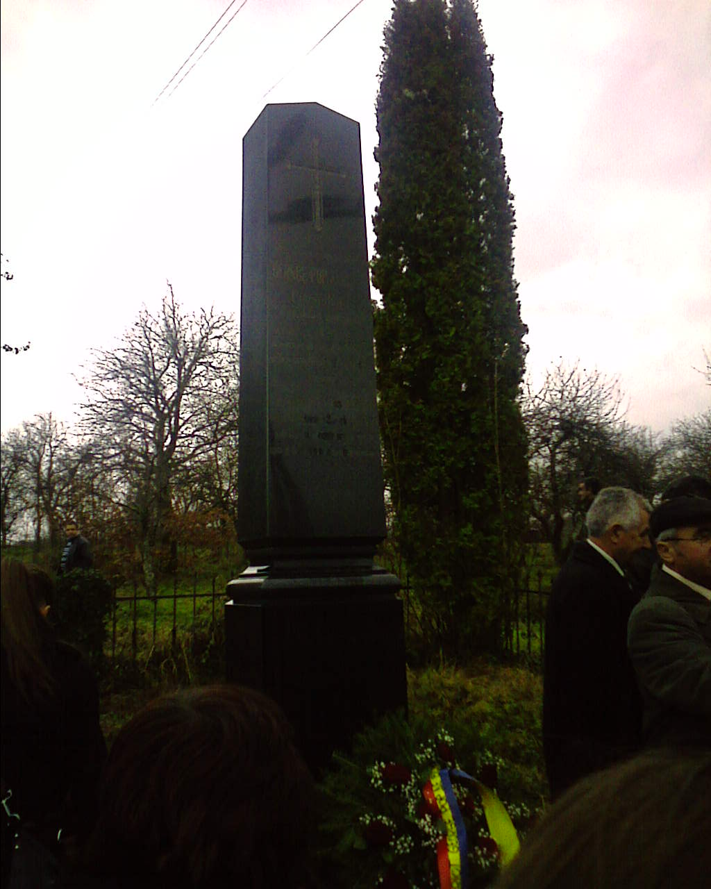 Mormântul lui Gheorghe Pop de Băseşti